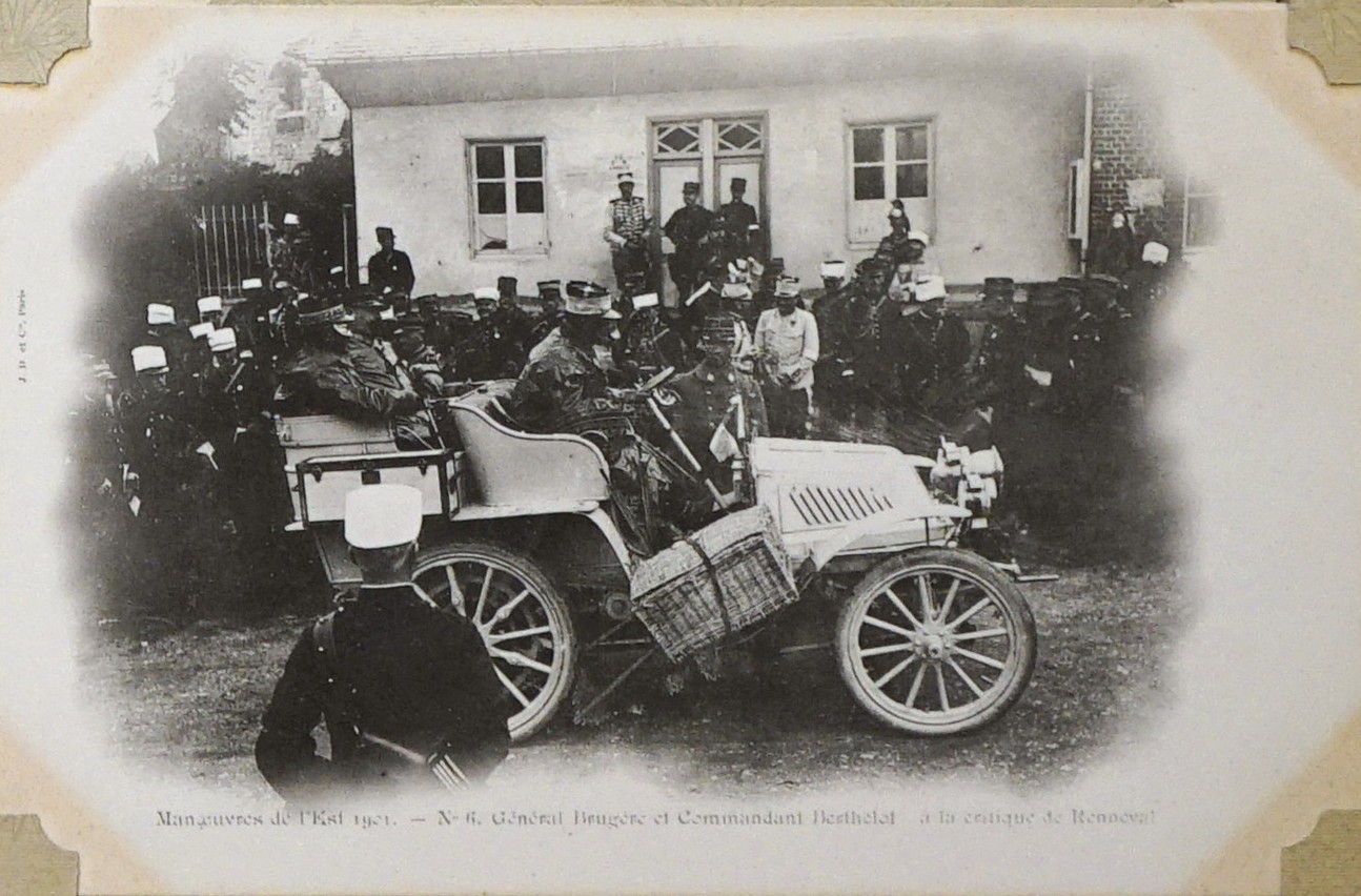 conservé en la B.M. de Reims.